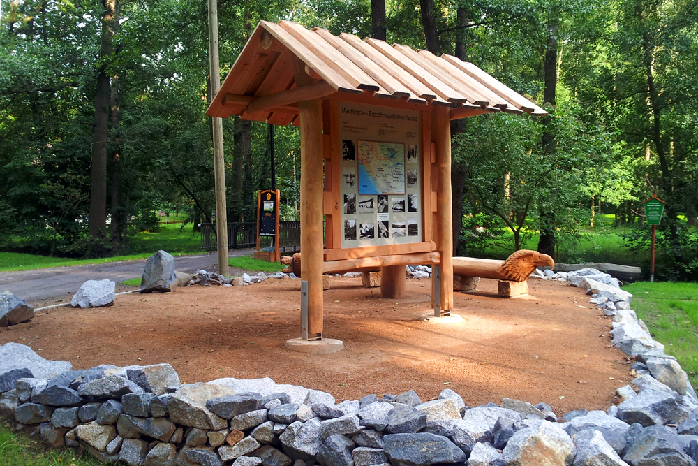 Gedenktafel für Max Hinsche im Hüttertal zwischen Wallroda und Radeberg, errichtet 2014